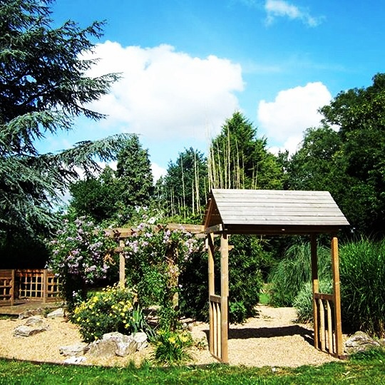 Millfield House Gardens